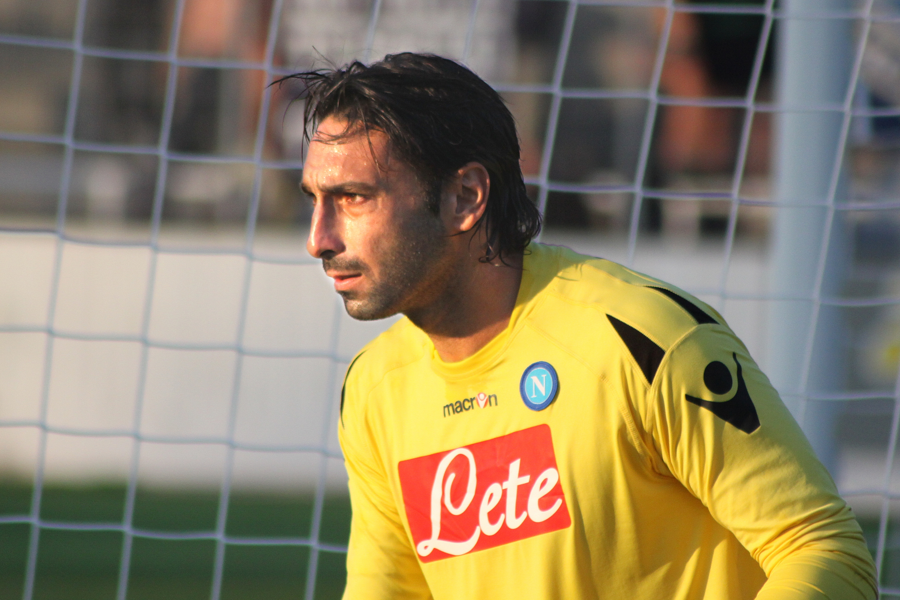 Gennaro Iezzo - SSC Neapel (3) Gennaro Iezzo - Società Sportiva Calcio Napoli